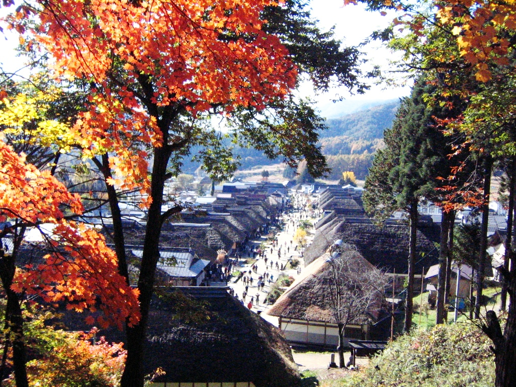 Ōuchi-juku,in Fukushima Prefecture,JAPAN.